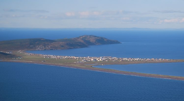 Village de Miquelon, vu d'avion